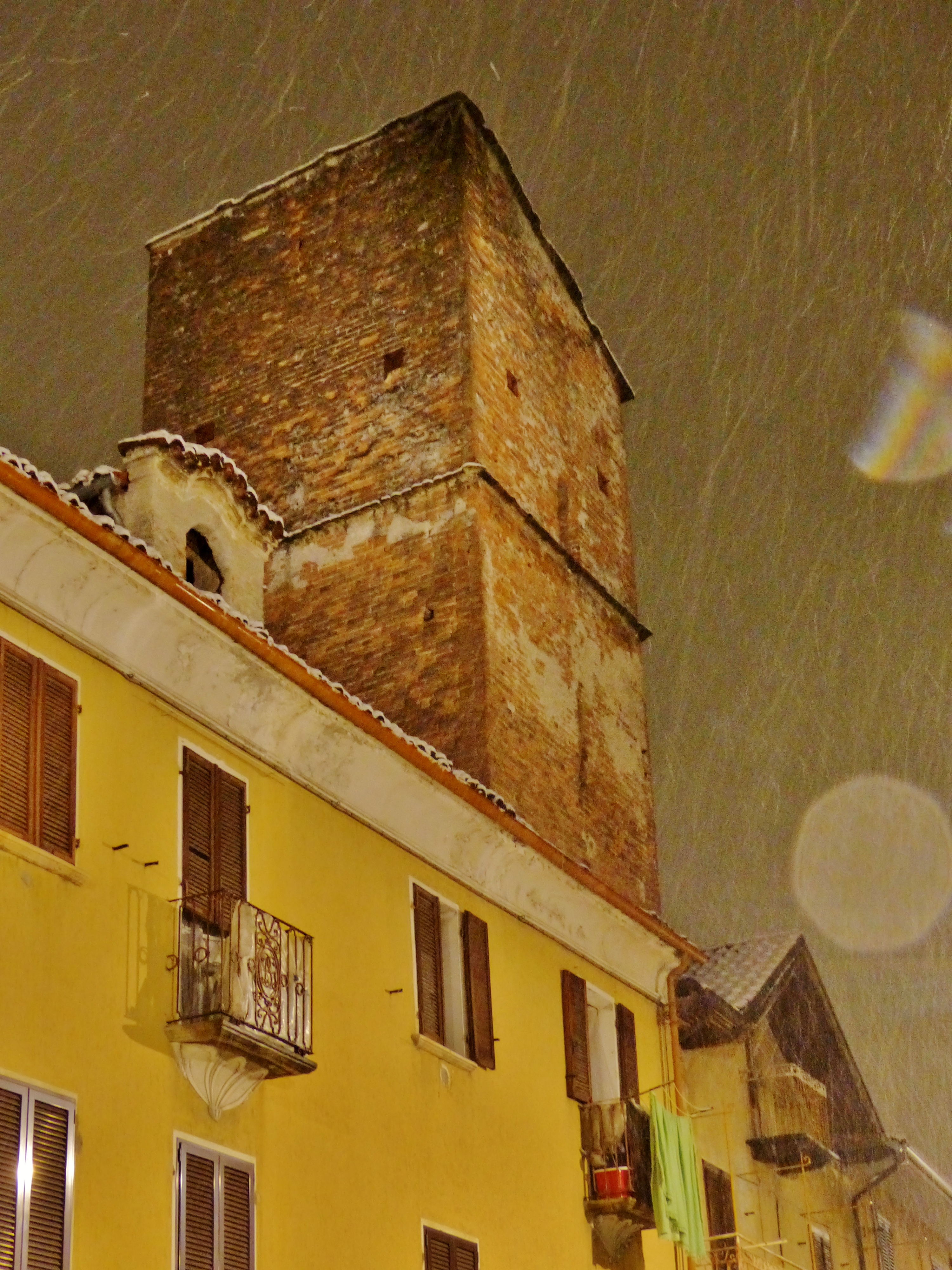 Sant'Ambrogio di Torino: Torre del Palazzo del Feudo.